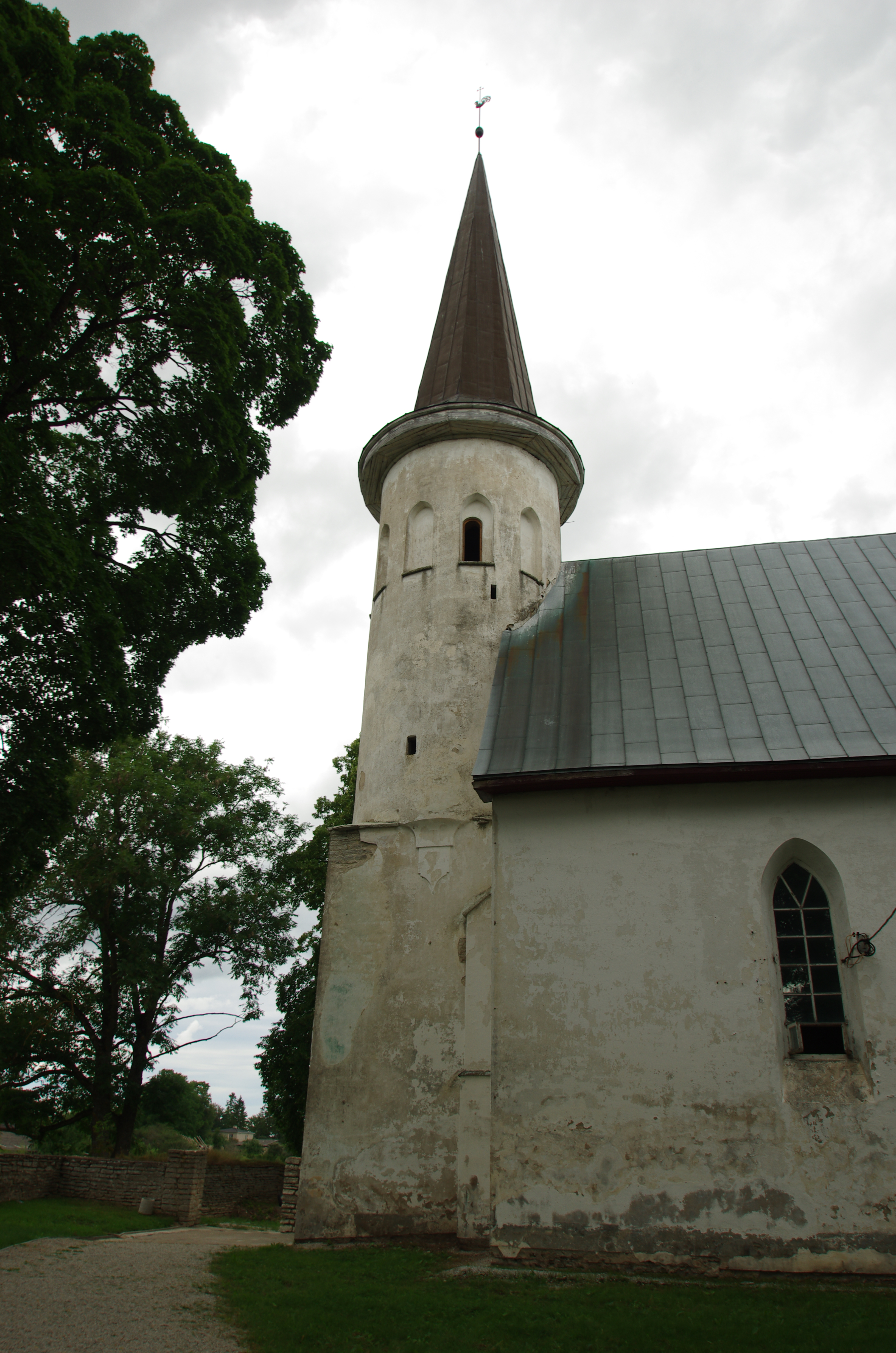 Lüganguse kirik